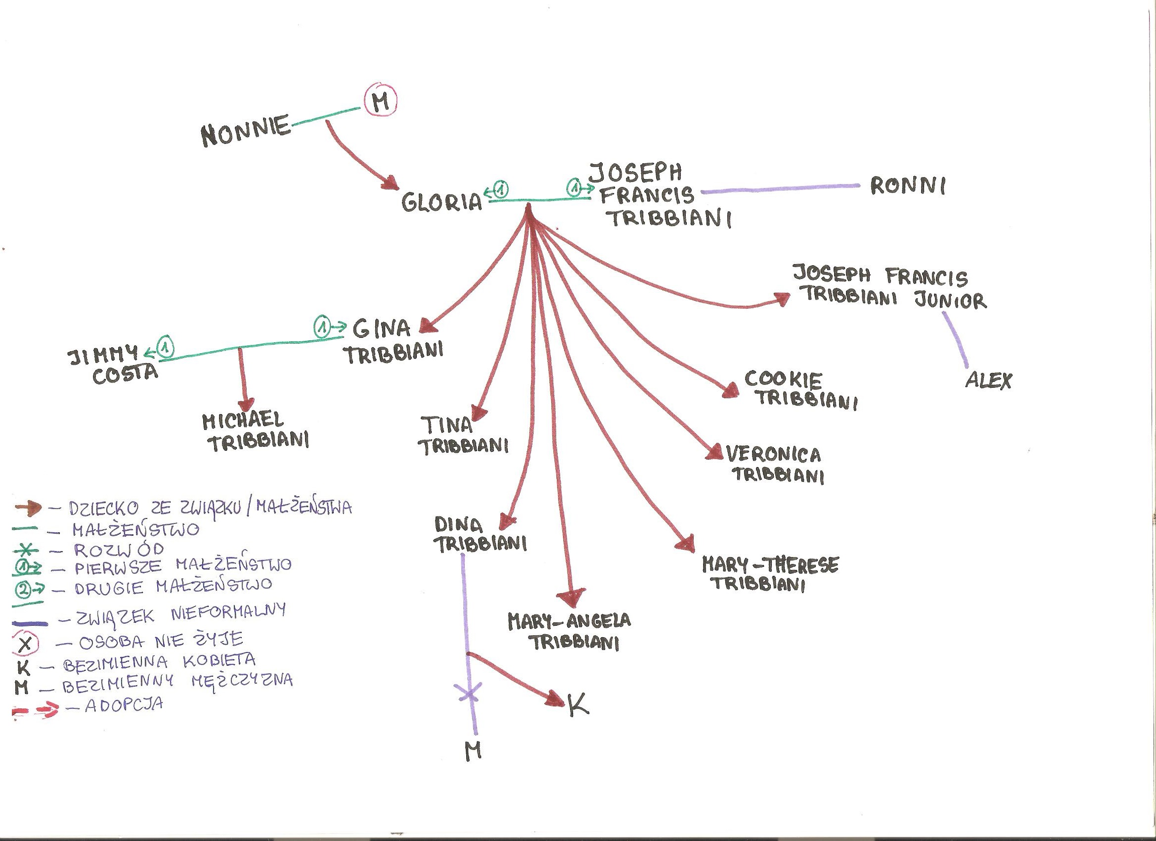 Drzewo genealogiczne Joey'a Tribbiani z serialu "Przyjaciele".